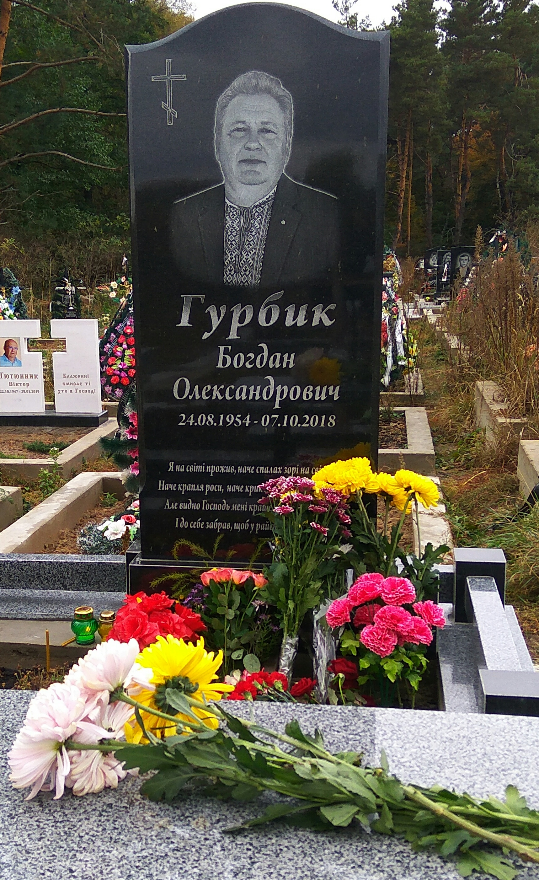 Место захоронения Богдана Александровича Гурбика на городском кладбище города Боярка на ул. Шевченко